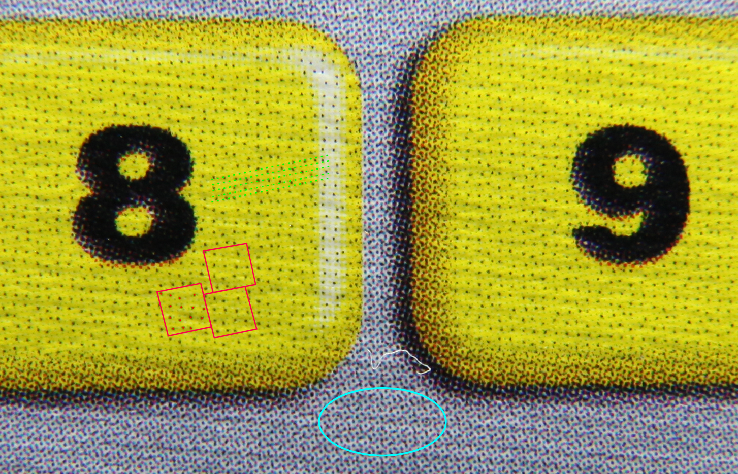 Digitales Papier; Tiptoi Spielkarte